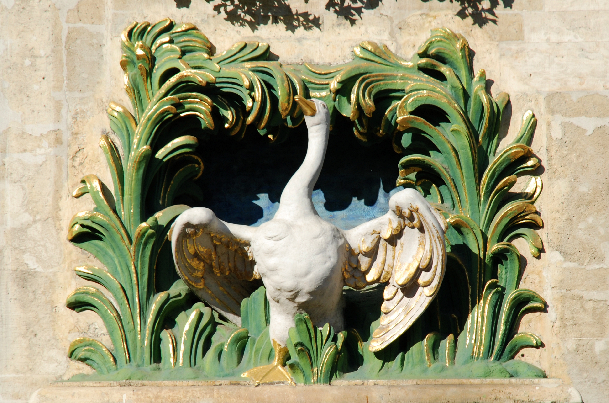 Belgique - Bruxelles - Grand-Place - Maison du Cygne